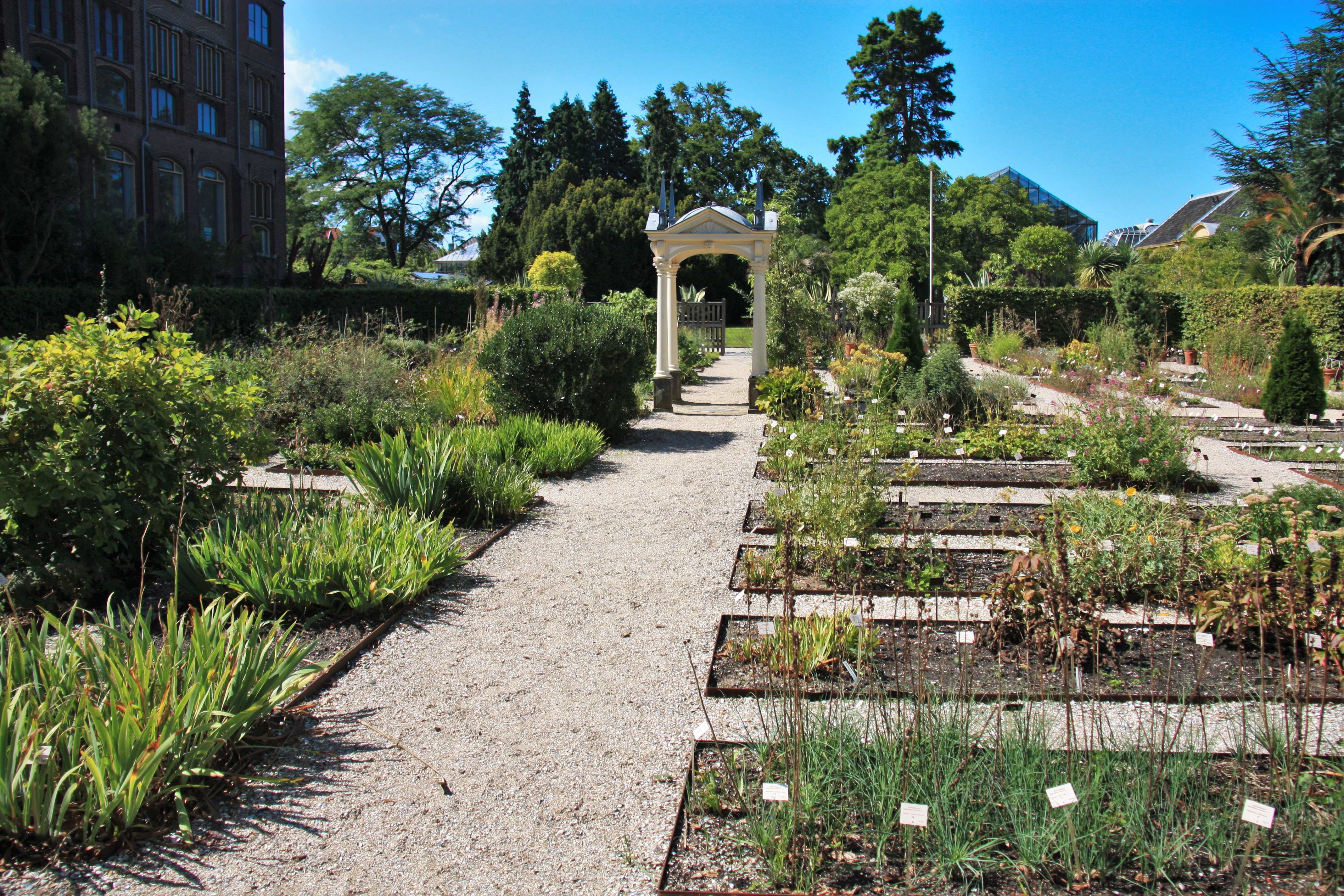 Сад Клузіуса у Лейденському ботанічному саду